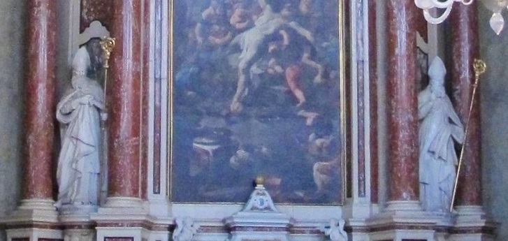 Statuen der heiligen Bischöfe Ingenuin und Albuin am Kassianaltar im Brixner Dom (1754-1756)